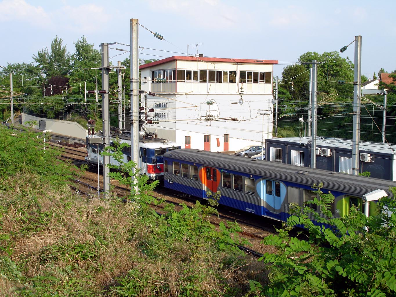 Gare d'Ermont - Eaubonne à Ermont et Eaubonne (Val-d'Oise) Ermont Poste 1 et rame inox banlieue (RIB) poussée par une BB 17000 en provenance de Paris-Nord Mai 2007 Photo personnelle (own work) de Clicsouris